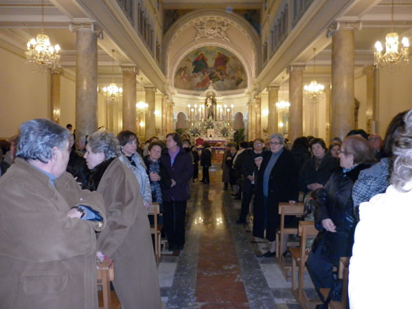 chiesa aspetta il rientro